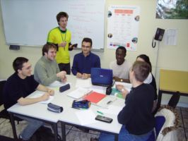 animateur de formation